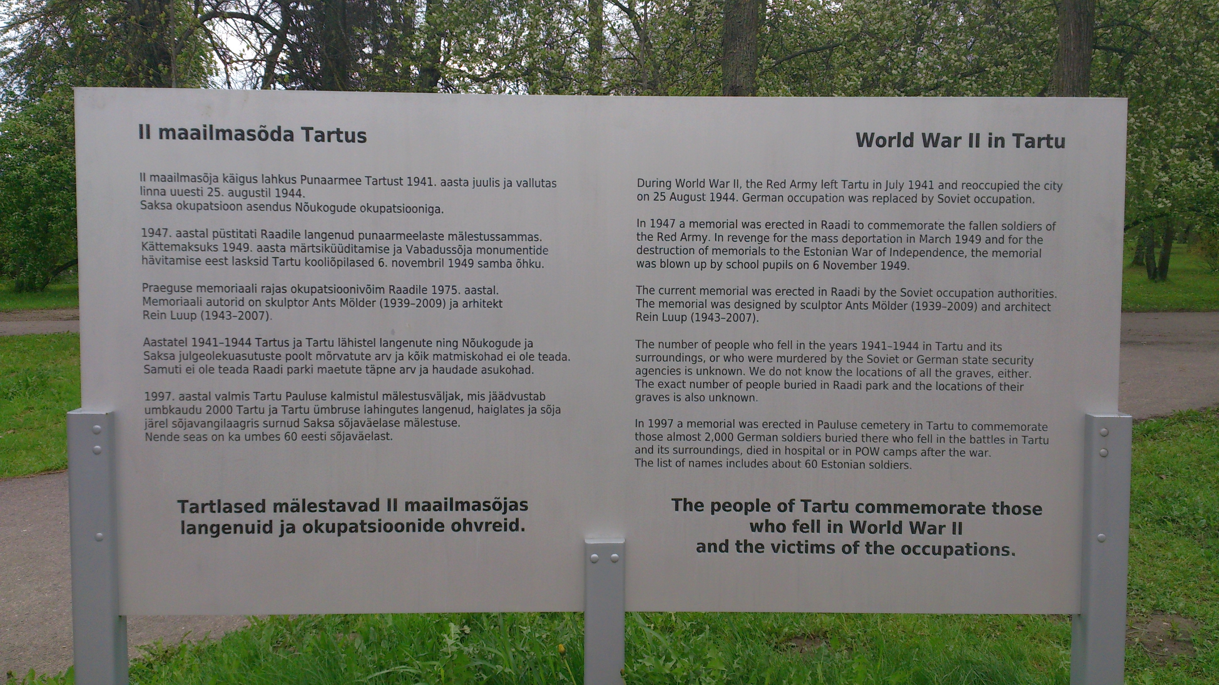 Eesti- ja ingliskeelsed kirjad infotahvlil Raadil Teise maailmasõja monumendi lähedal, 14. mai 2014